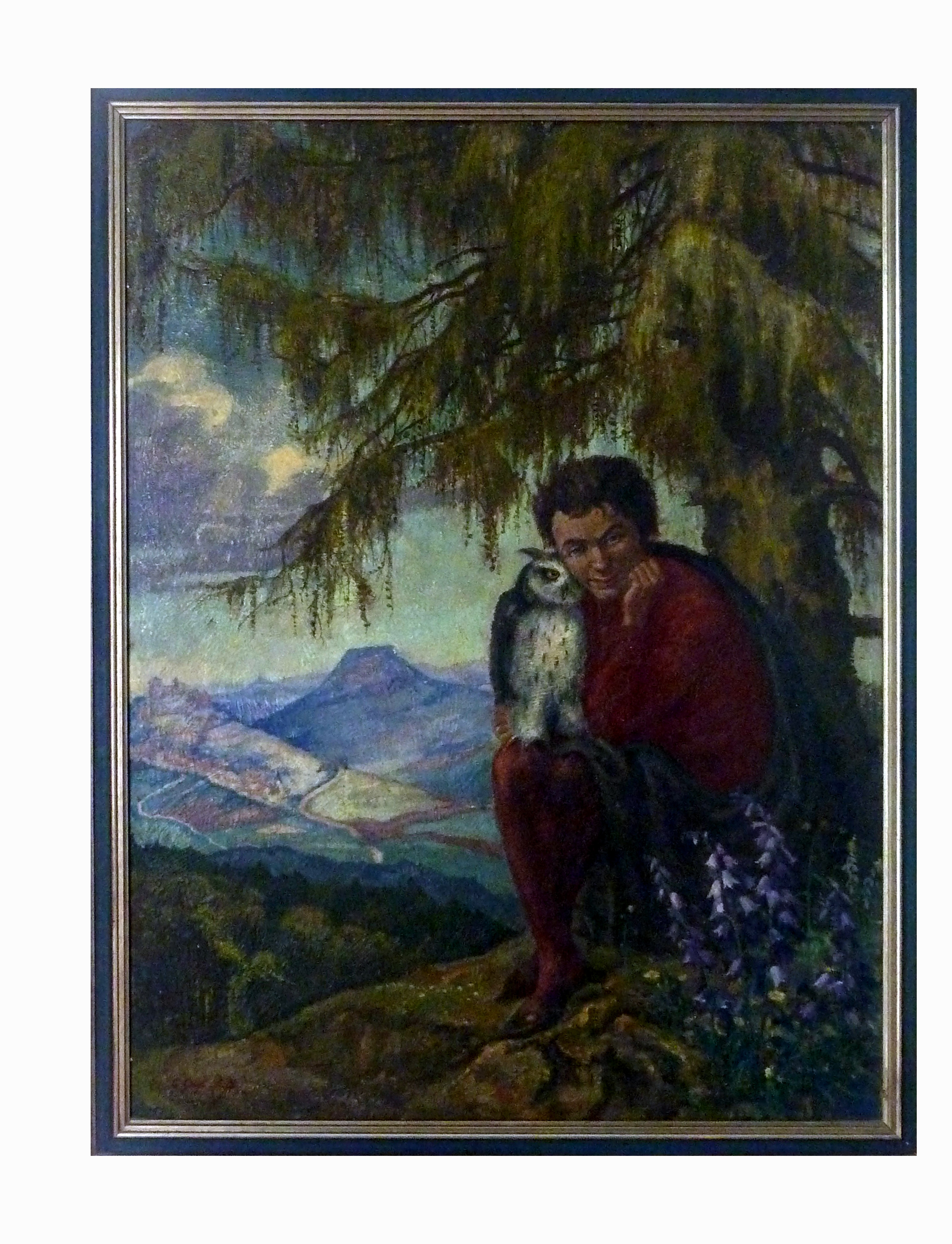 Eulenspiegel, Öl auf Leinwand, signiert 1935